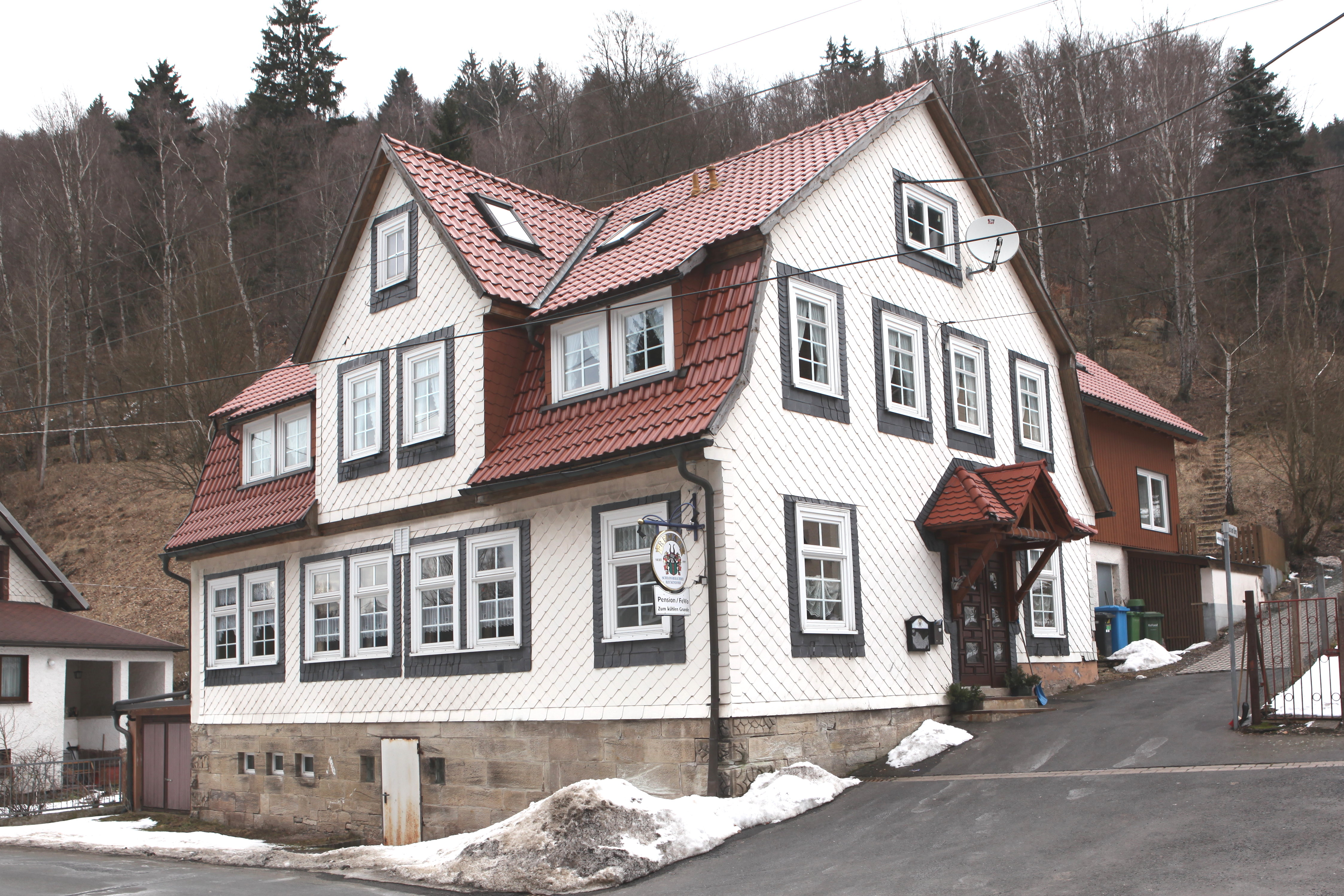 Gasthof Zum-Kühlen-Grunde in Tellerhammer, OT von Schleusegrund, Landkreis Hildburghausen